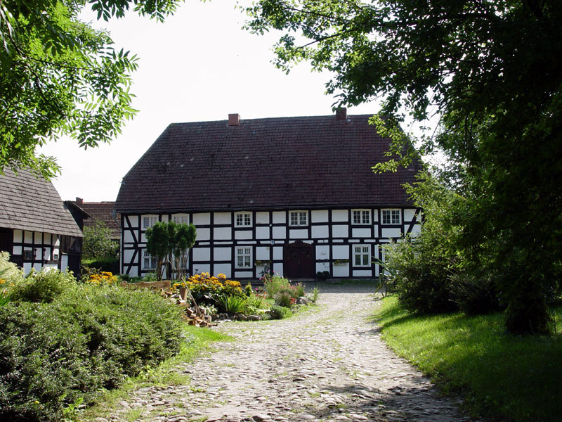 Zagroda nr 18 w Swołowie, przykład budownictwa szachulcowego (szkieletowego) datowana na 1865 rok zdjęcie własne z sierpnia 2005 r. 05.2005.